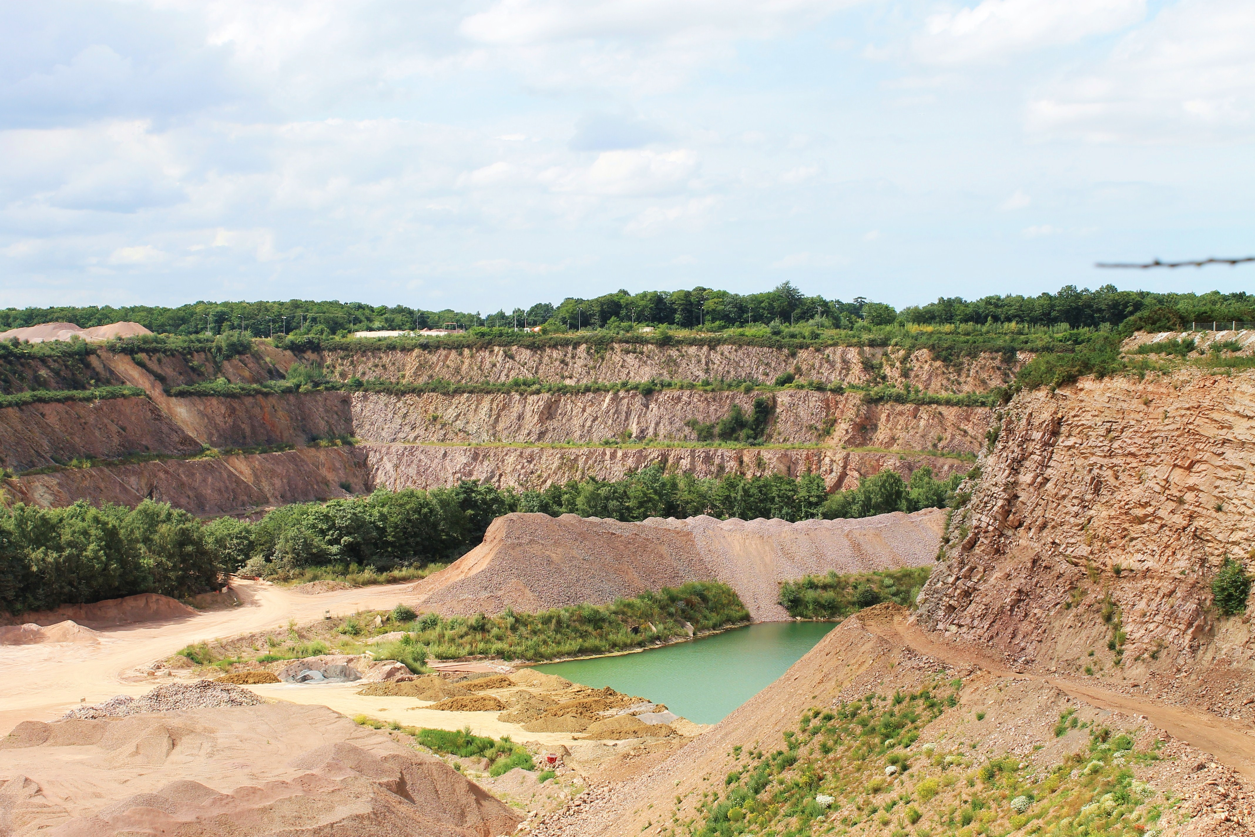 Carrières de Mouen (Calvados)